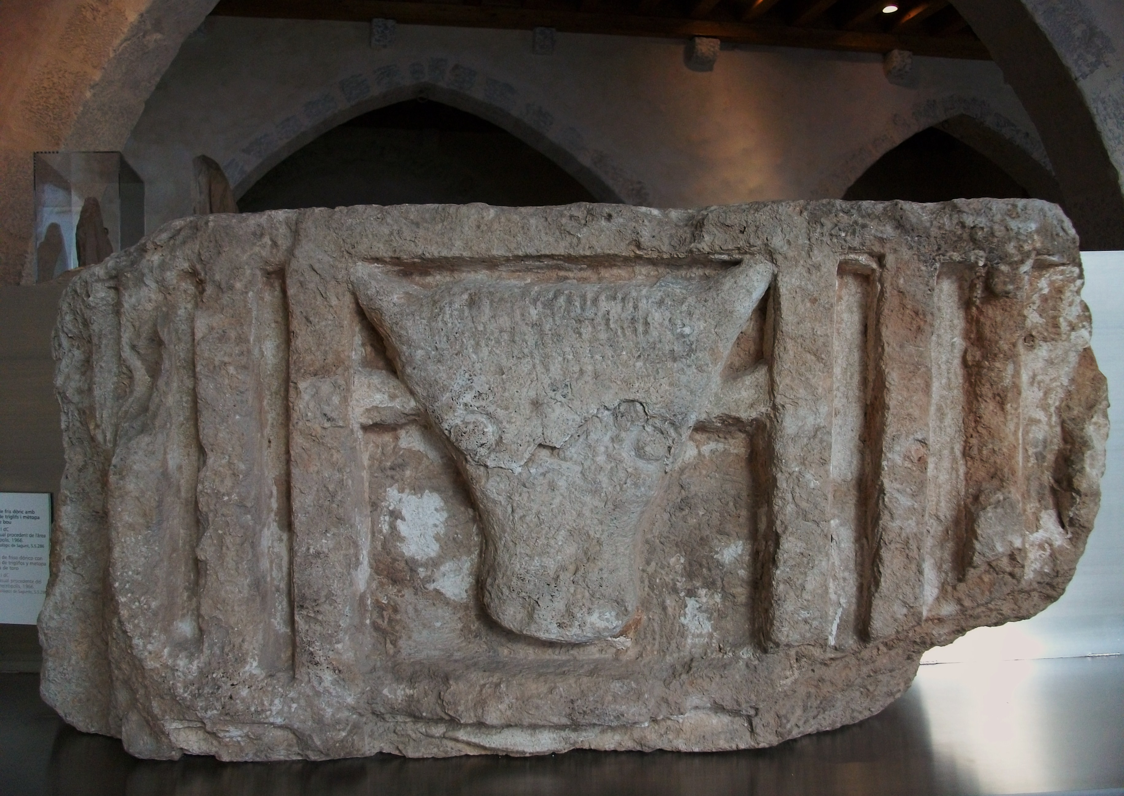 Fragment de fris dòric amb decoració de tríglifs i mètopa amb cap de bou, Museu Històric de Sagunt (MUHSAG). Del segle I aC - I dC, troballa casual procedent de l'àrea de la necròpolis (1966).